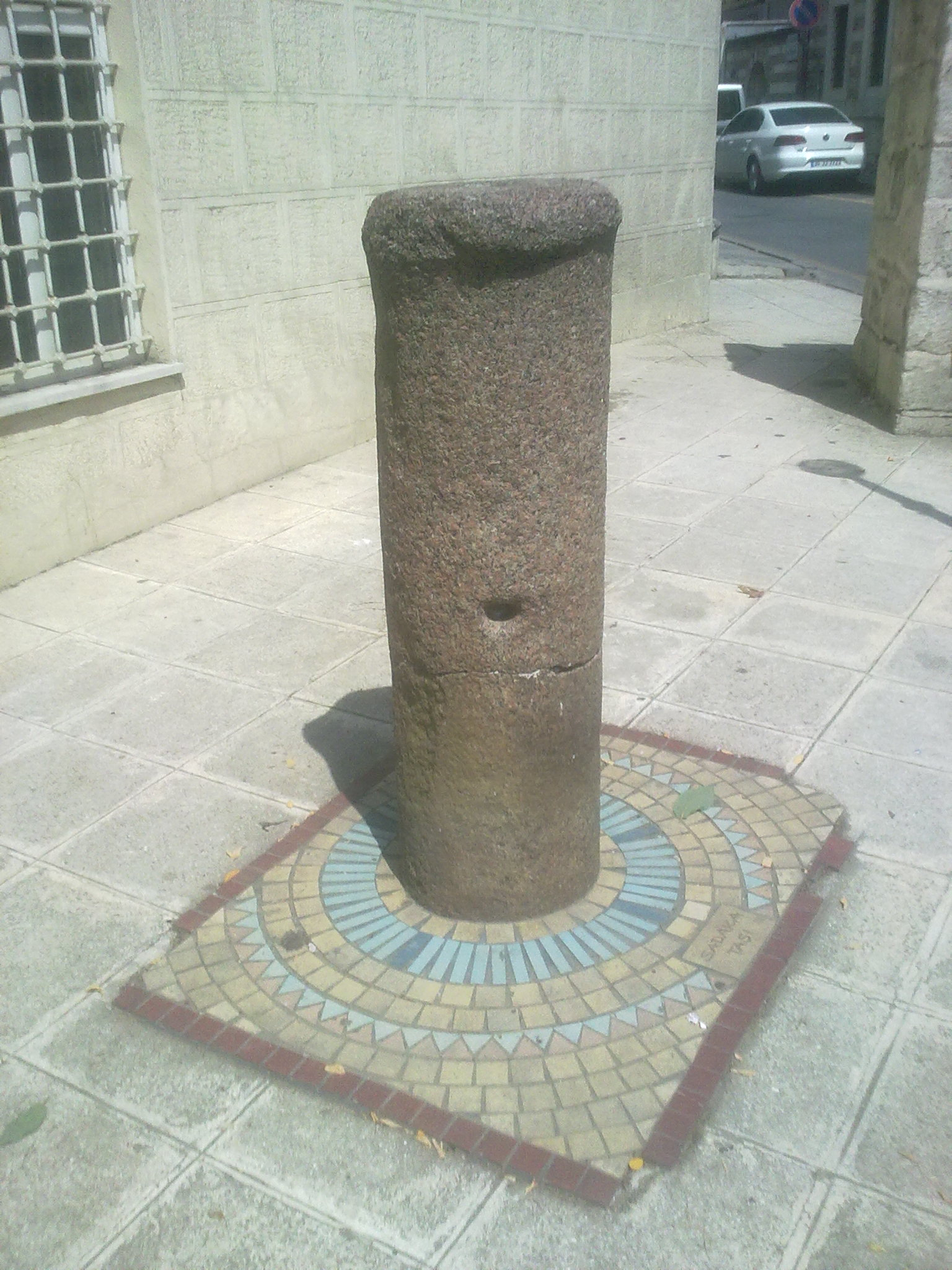 İmrahor Camii (Üsküdar)'nden görüntü